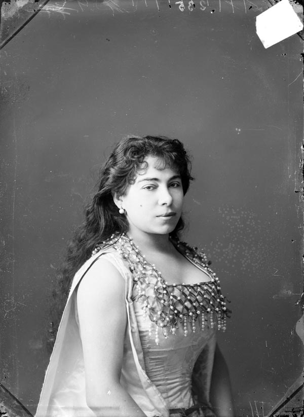 Retrat de bust de la soprano Elena Teodorini